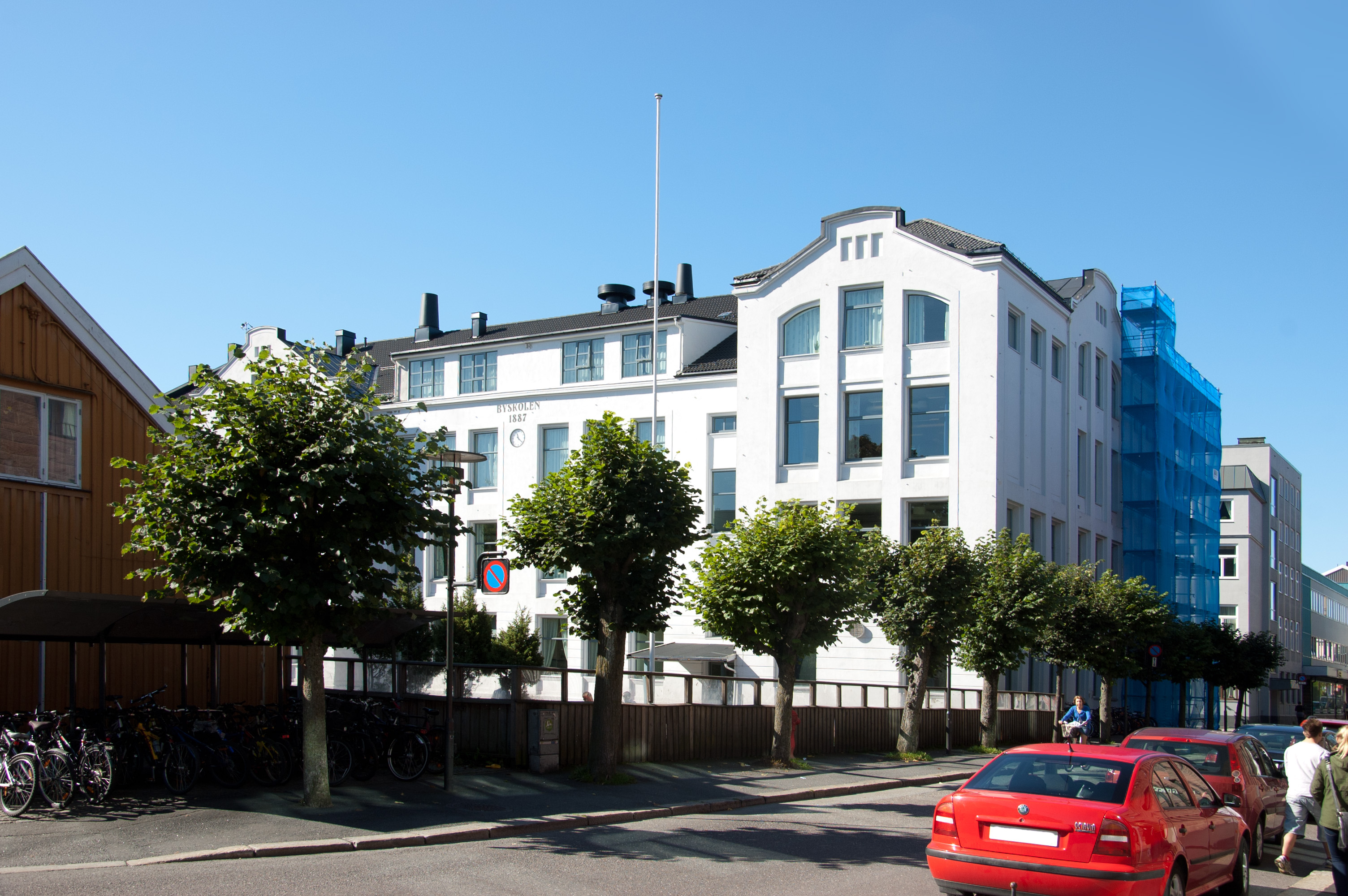 Byskolen, barneskole i Sandefjord